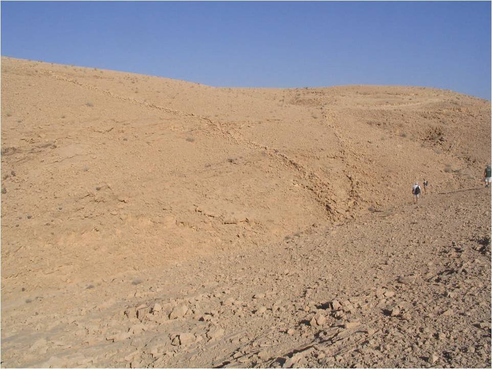 Desert Kite Archaeology Sites in the Negev South of Israel Dated8,300-4,500BC עפיפוני המדבר הינם מתקנים ששימשו לצייד המוני של עדרי חיות בר. עפיפוני המדבר ידועים היום בארבע מוקדים מרכזיים במזרח התיכון: עפיפוני הנגב, הערבה וסיני, עפיפוני מזרח ירדן, עפיפוני ערב הסעודית ועפיפוני המדבר הסוריה. ניתן לראות כי עפיפוני הנגב, הערבה וסיני הם קטנים יחסית בממדיהם, בעוד שעפיפוני ירדן וסוריה הם גדולים מאוד ונבנו לרוב בשרשראות. בעפיפוני סוריה ערב הסעודית ניתן לראות דבר שונה מעט, כאשר לעיתים ניתן לראות עפיפון אחד עם מספר בורות הריגה. האתרים מתוארכים לשנים 8,300-4,500 לנני הספירה עפיפון סיירים הנמצא בבקעת עובדה בנגב